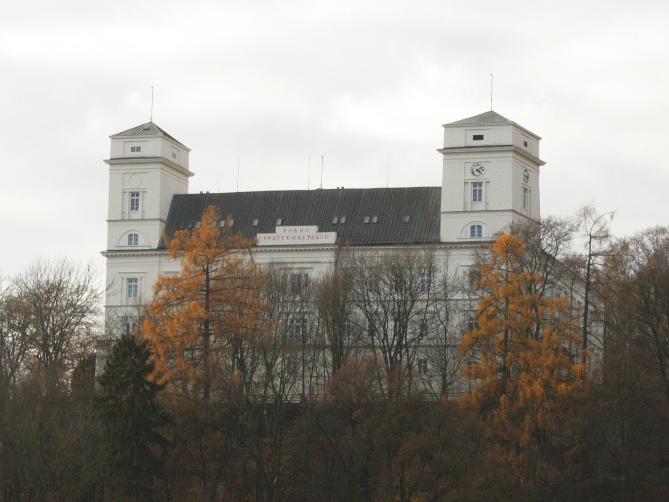 Račice (Račice-Pístovice) - zámek, pohled od severu